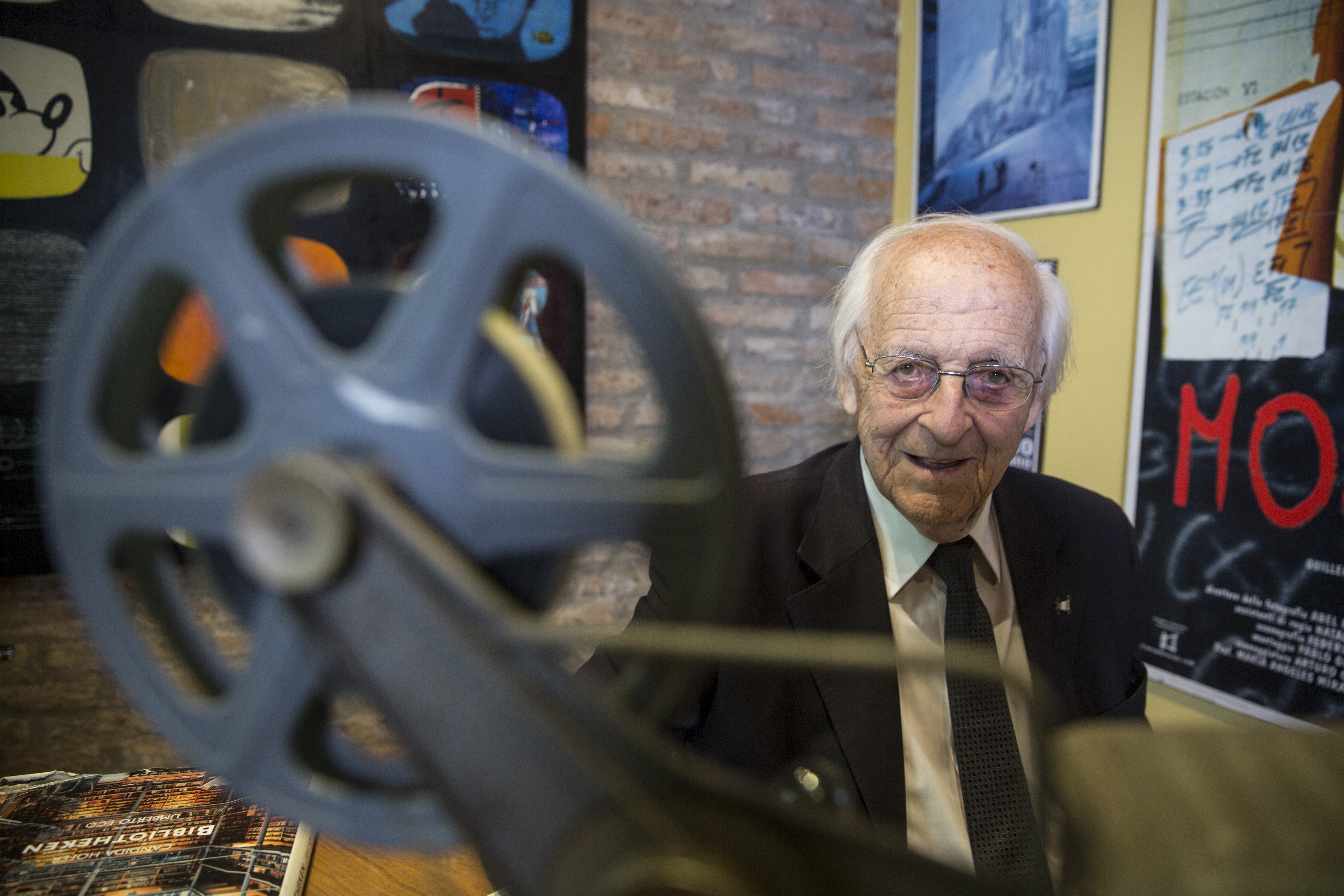 Buenos Aires, 6 de marzo de 2019._ Manuel Antín, es un novelista, dramaturgo, poeta y director de cine argentino. Es principalmente conocido por su carrera cinematográfica, durante la cual realizó 12 largometrajes de ficción, entre 1960 y 1982, entre los que se destacan La cifra impar y Don Segundo Sombra. Fotos: Kaloian/ Secretaría de Cultura de La Nación.